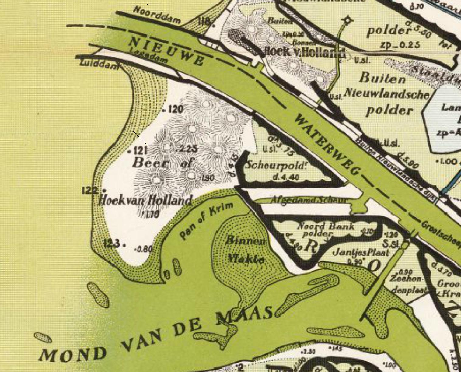 Maasmonding ca 1910 met Nieuwe Maas, Hoek van Holland, De Beer